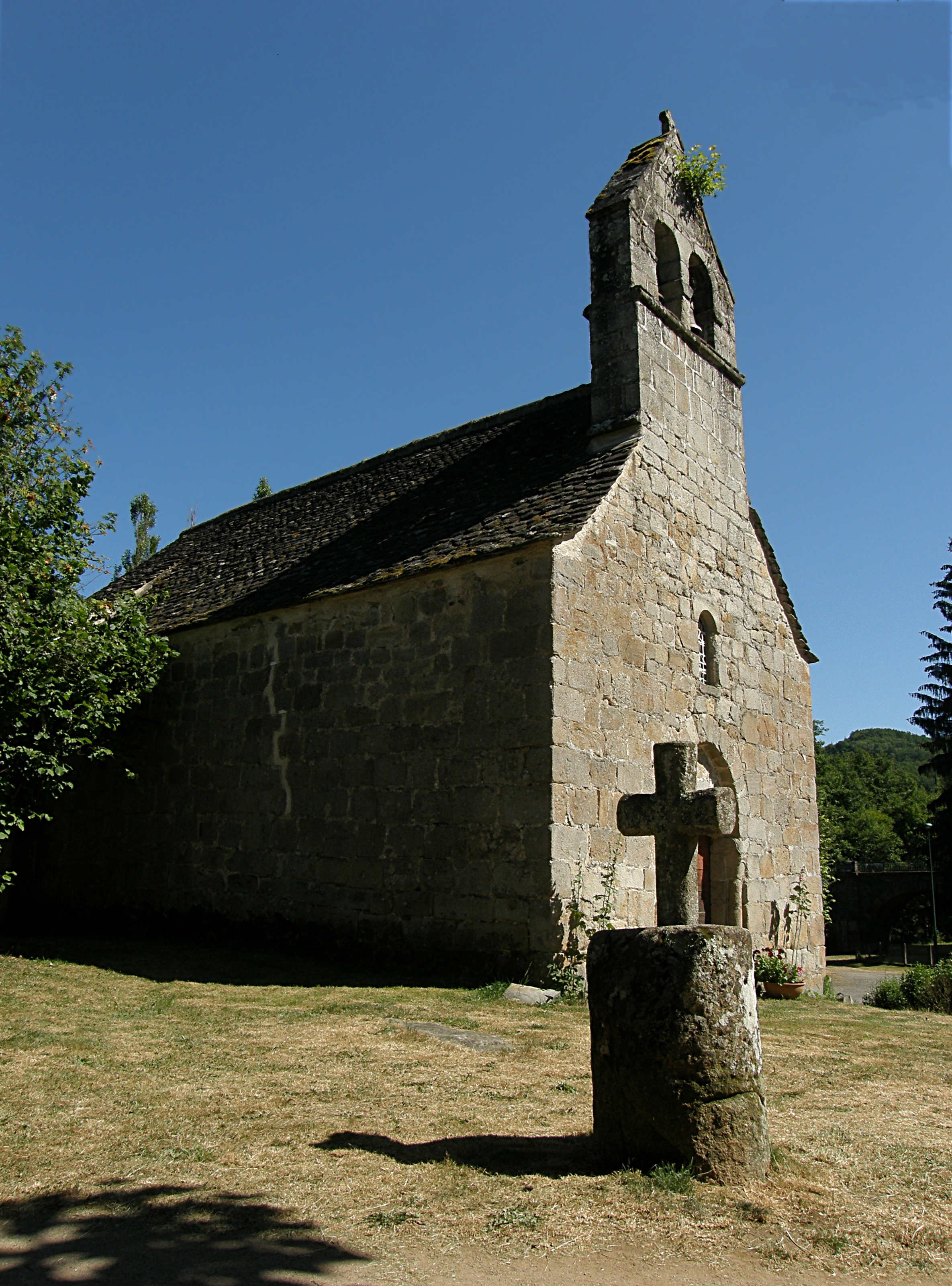 XIIe siècle Vendes Cantal France